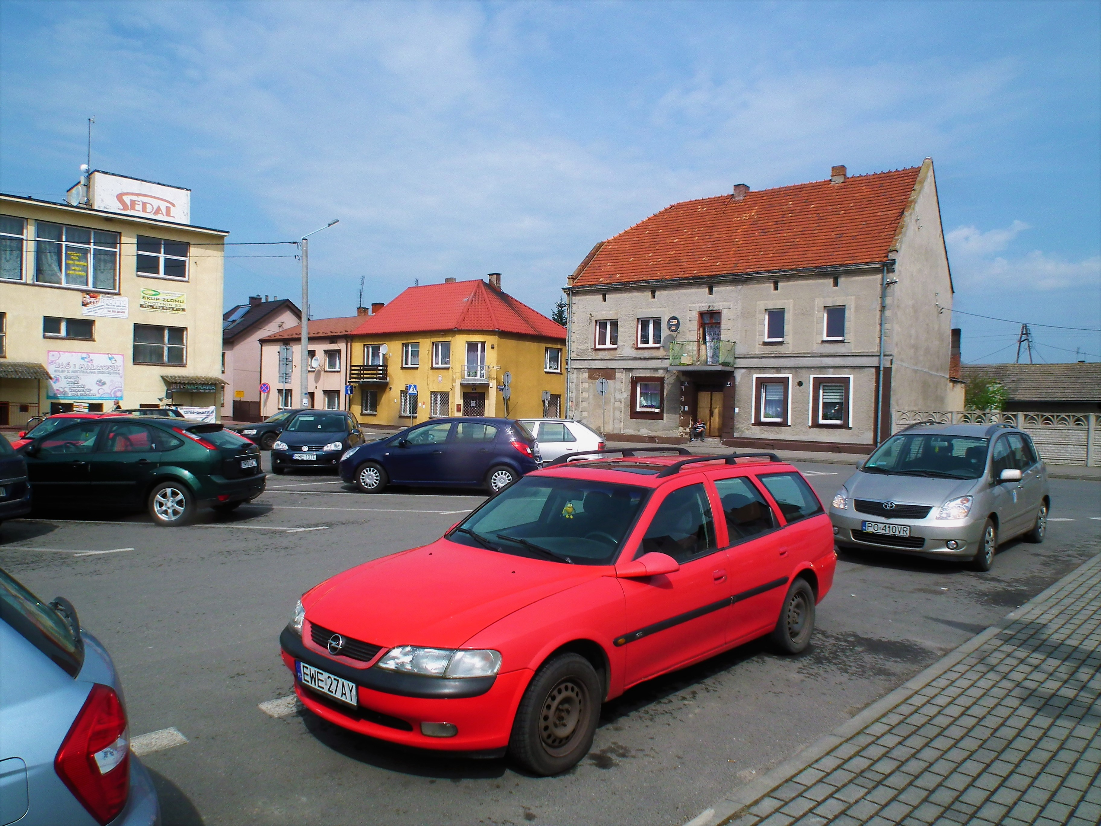 Rynek w Bolesławcu w pow. wieruszowskim.